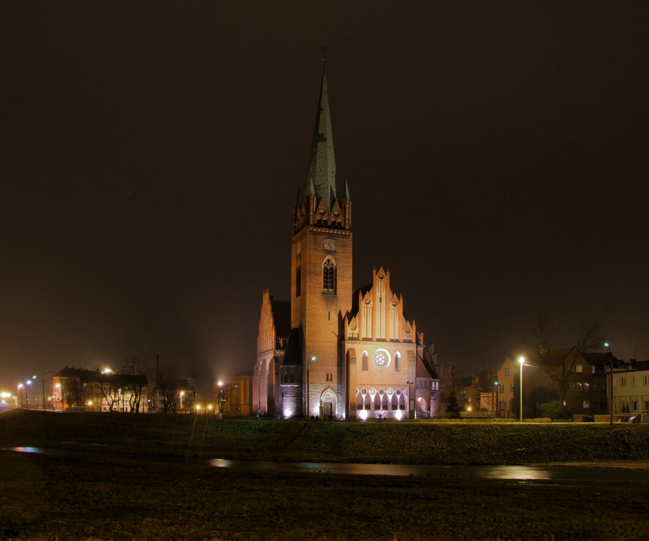 Legnica (Legnitz) - kościół św. Jacka w nocy